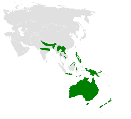 Megalurus distribution map